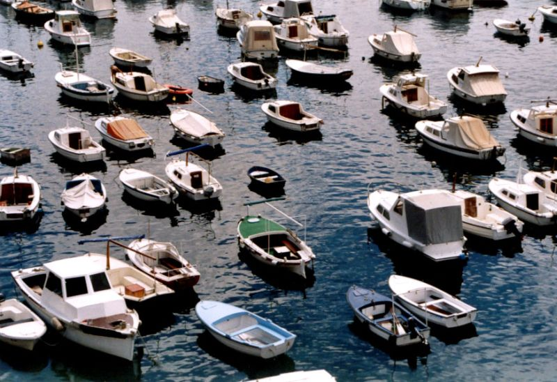 viele kleine Boote im Hafen von Dubrovnik